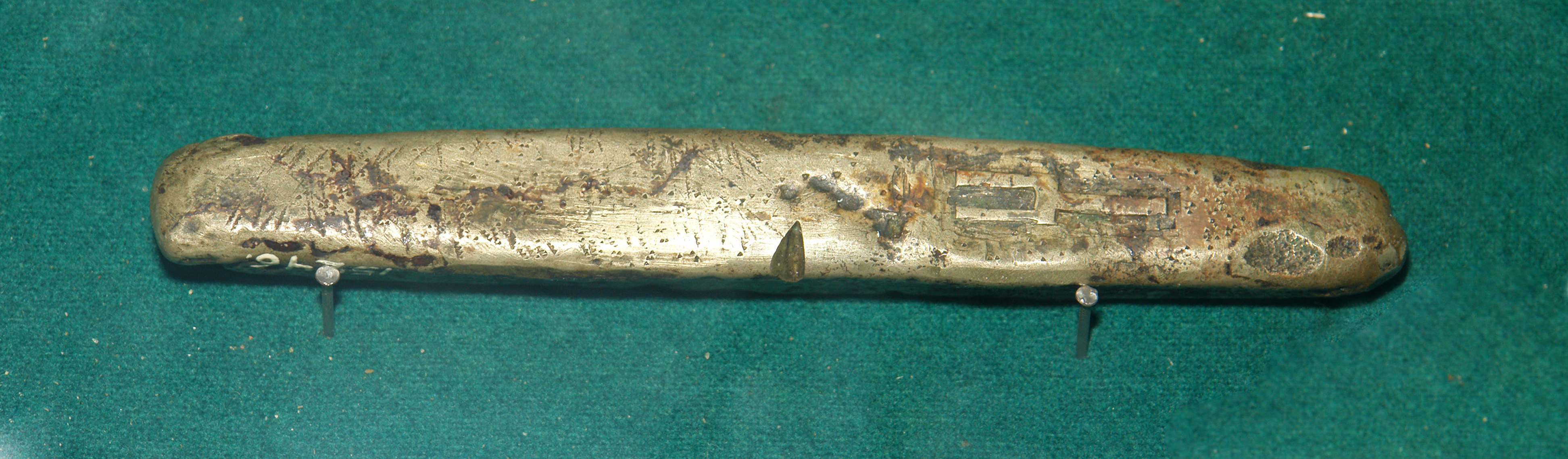 Древнерусская гривна. Вес 200,2 г. Центральный Военно-Морской музей, Санкт-Петербург.